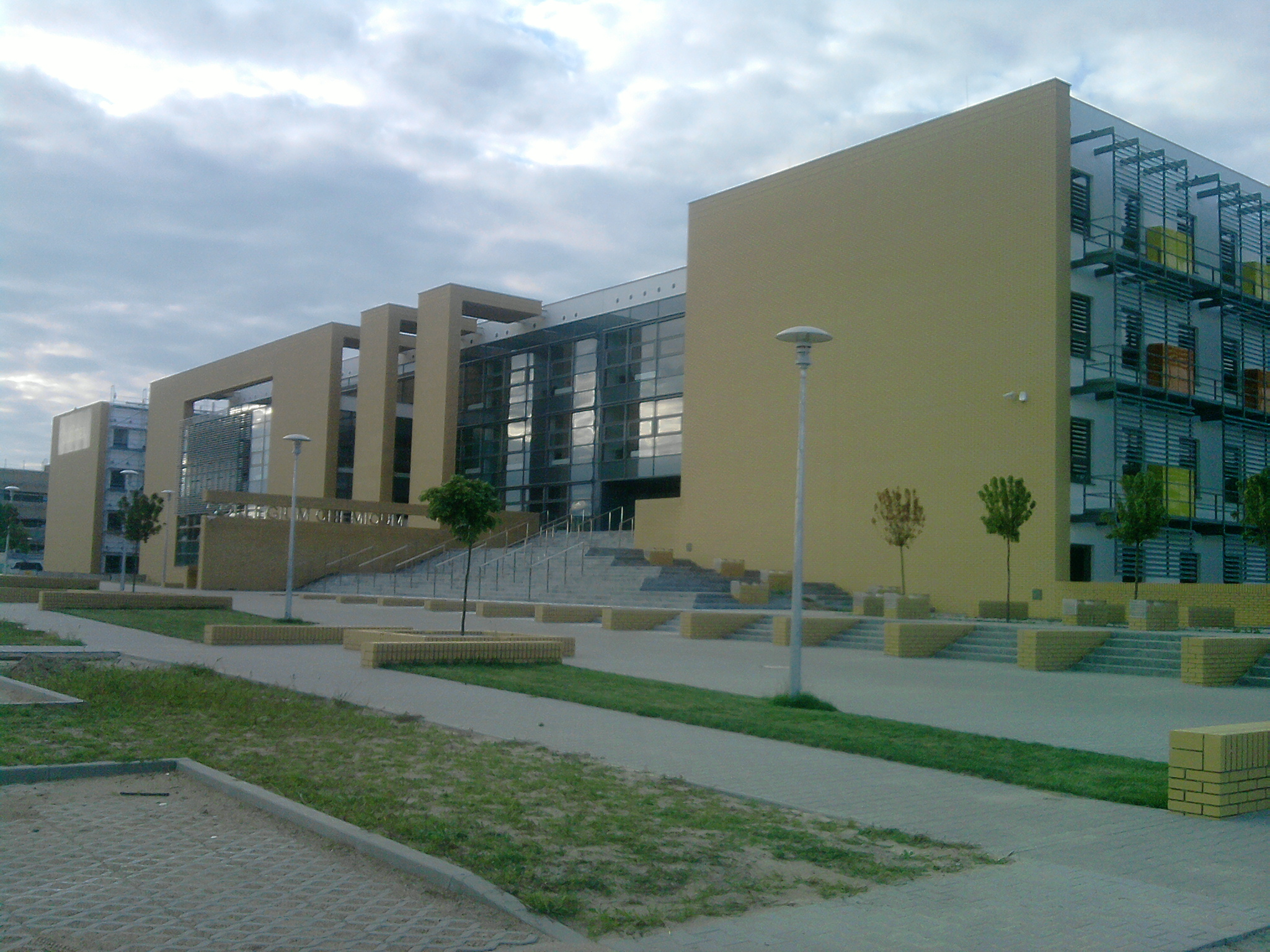 Kampus Morasko August 2012